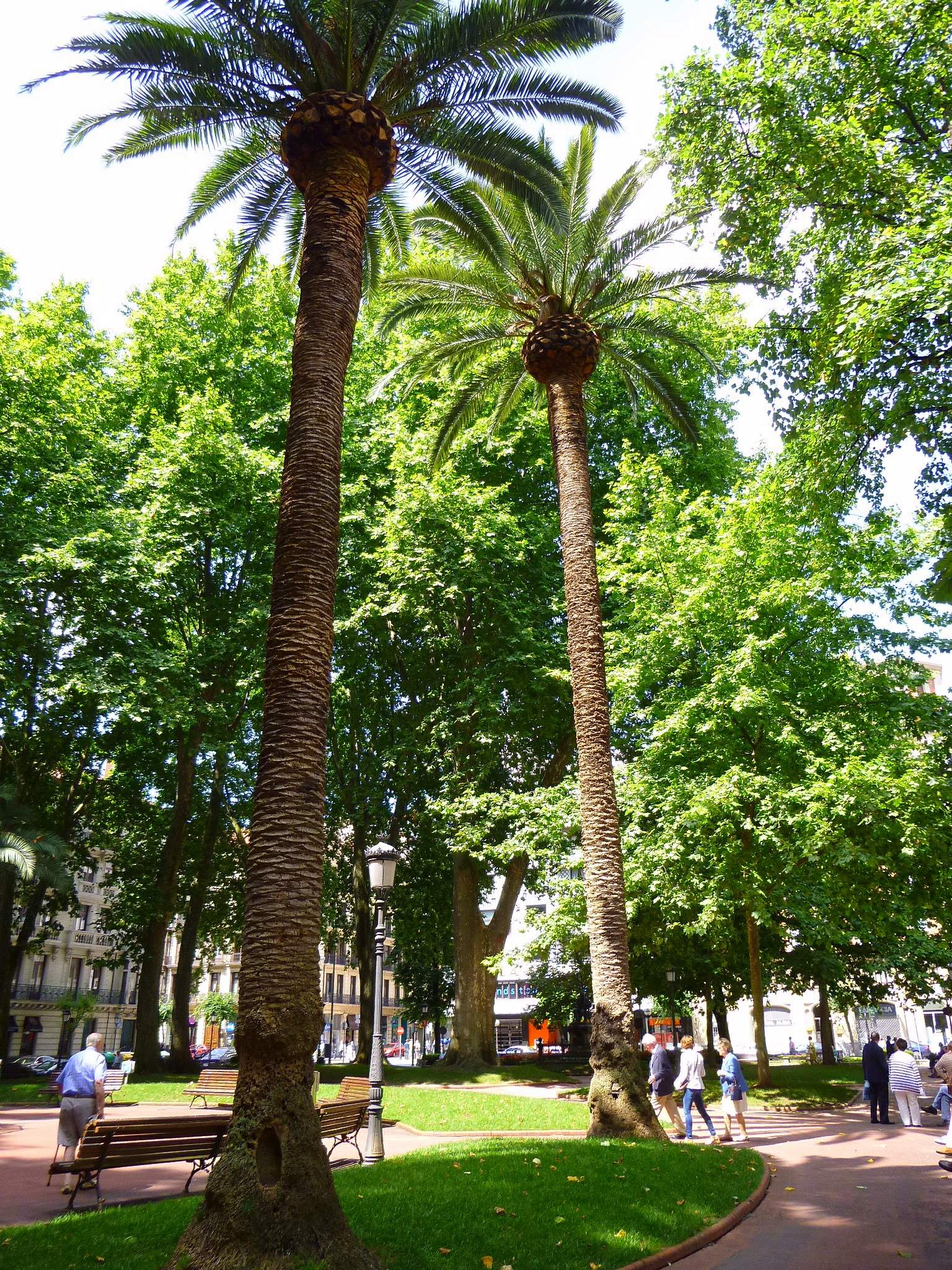 Jardines de Albia (Bilbao)